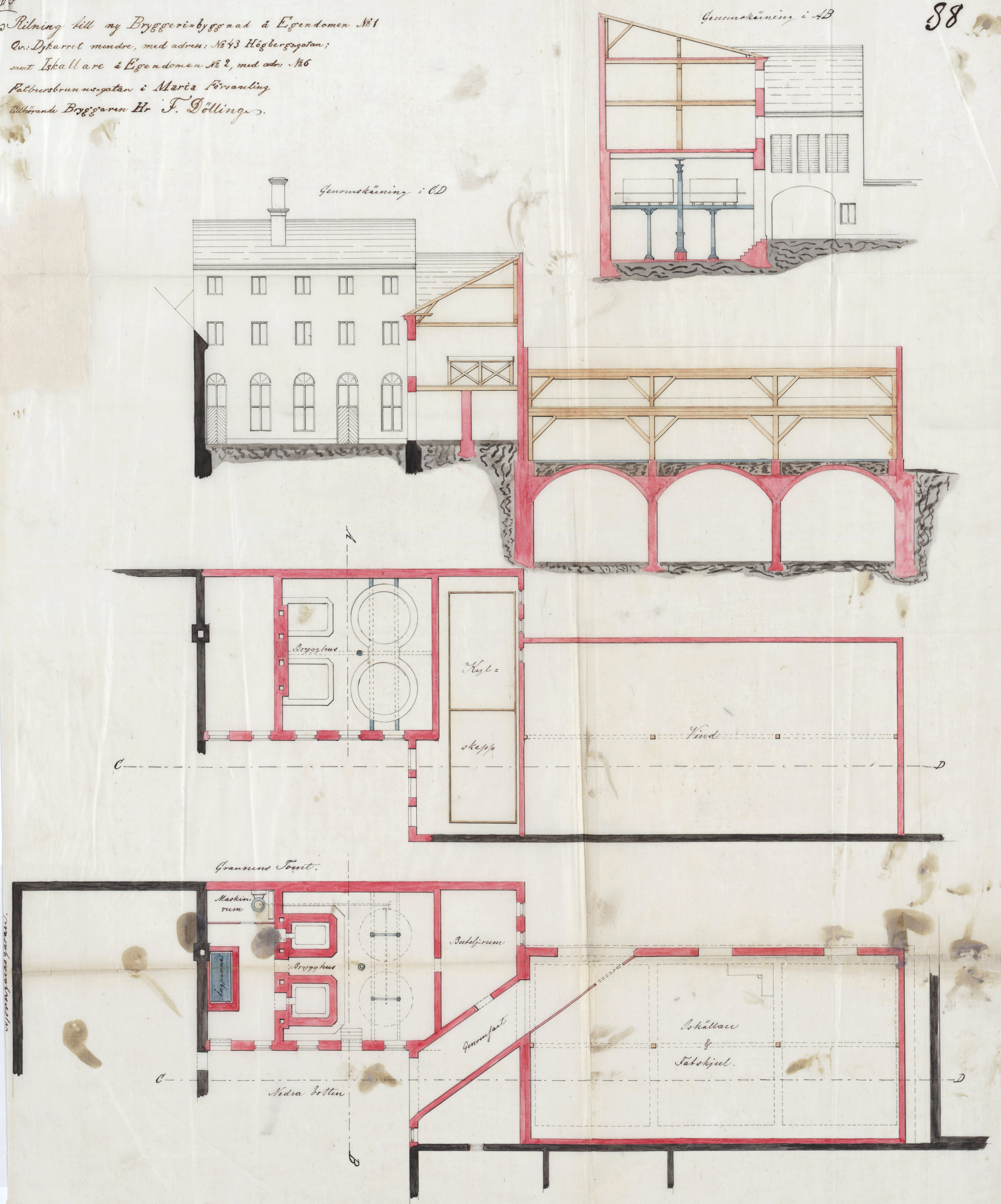 Ritning för Nürbergs Bryggeri, beställare bryggare Fritz Dölling.